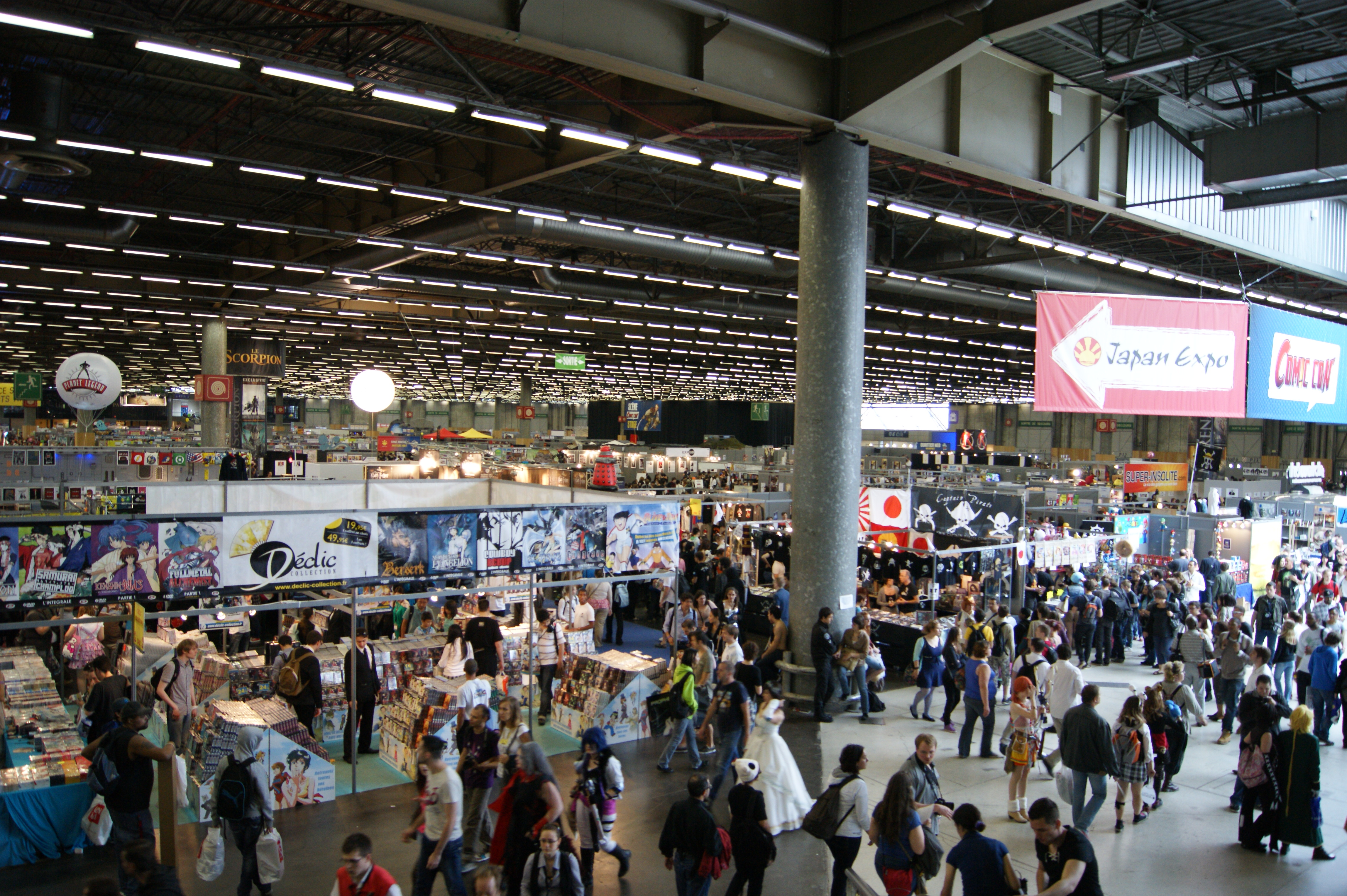 Vue générale - Japan Expo 2012